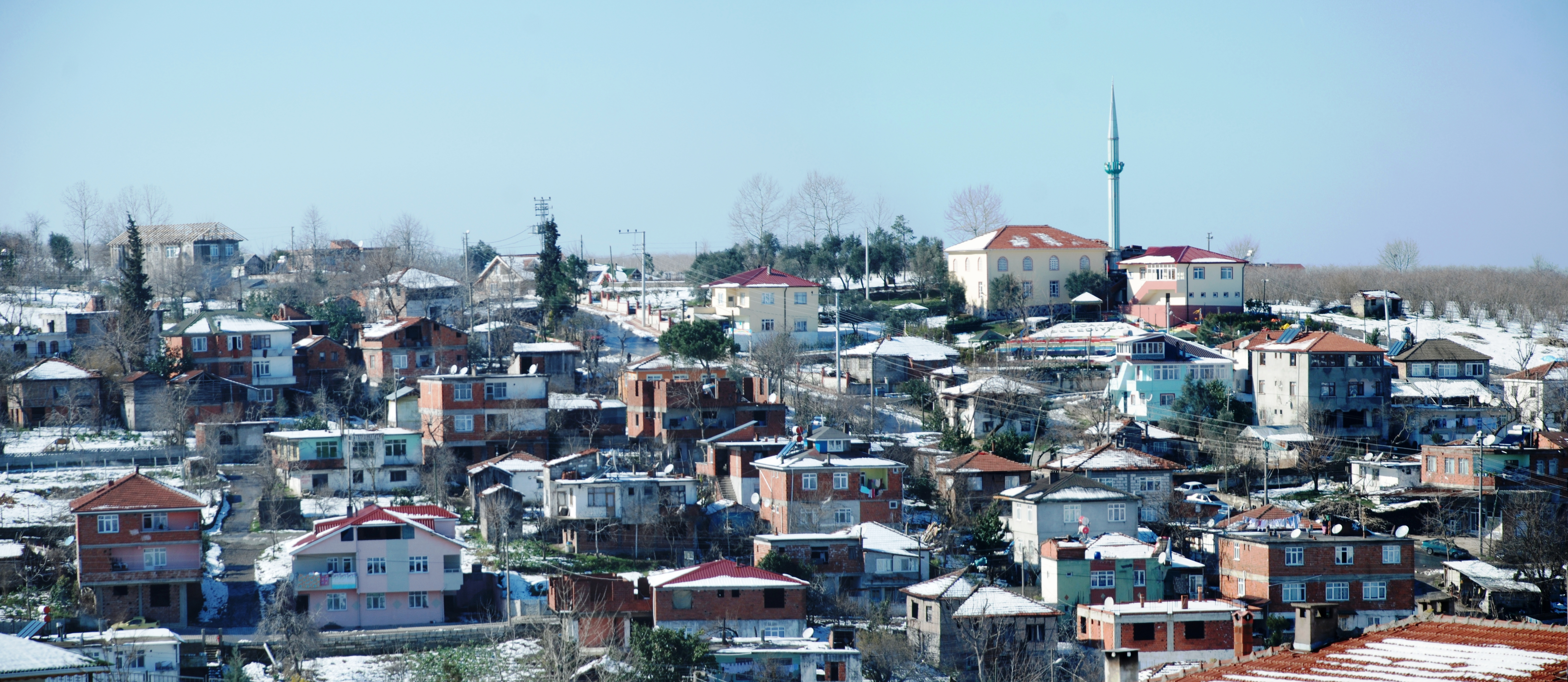 Sakarya ili, Kocaali ilçesi, Karşı Mahalle.